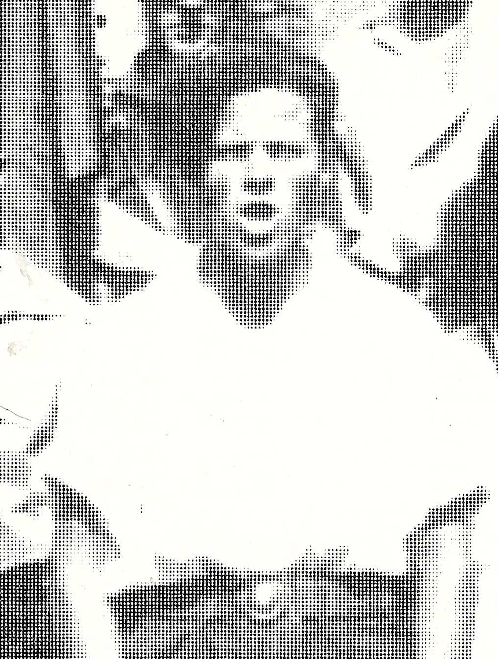 Jupp Messinger (1907-1933), Mitglied des KJVD (Kommunistischer Jugendverband Deutschlands) Ortsgruppe Bonn-Beuel, Ausschnitt aus einem Gruppenfoto, ca. 1932